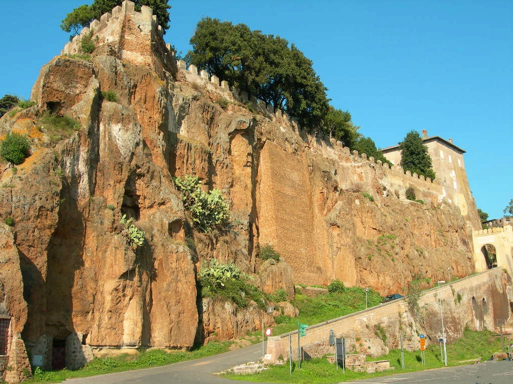 Ceri est une petite ville du Latium, une frazione de la comune de Cerveteri dans la province de Rome